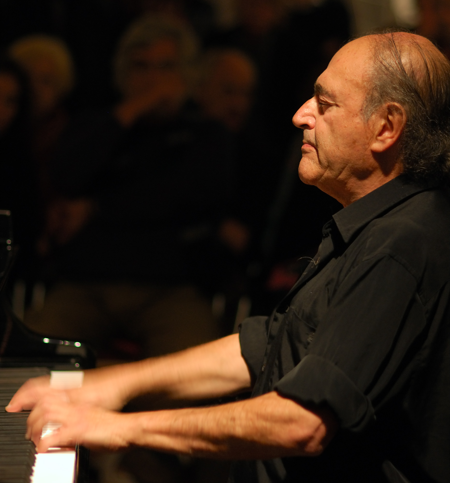 Carles Santos Ventura Artist, Composer, Pianist in Instituto Cervantes Berlin Exhibition 'Viva el Piano' or 'Visca el piano'